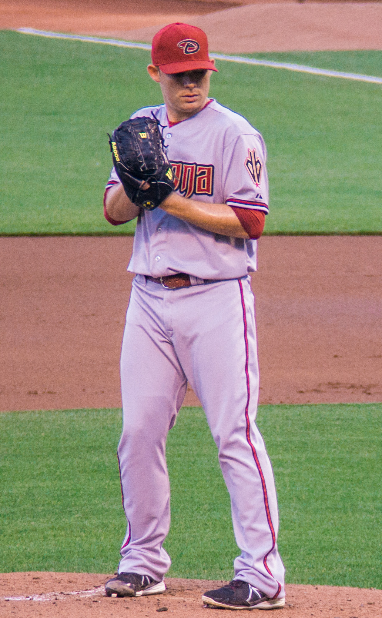 Ian Kennedy